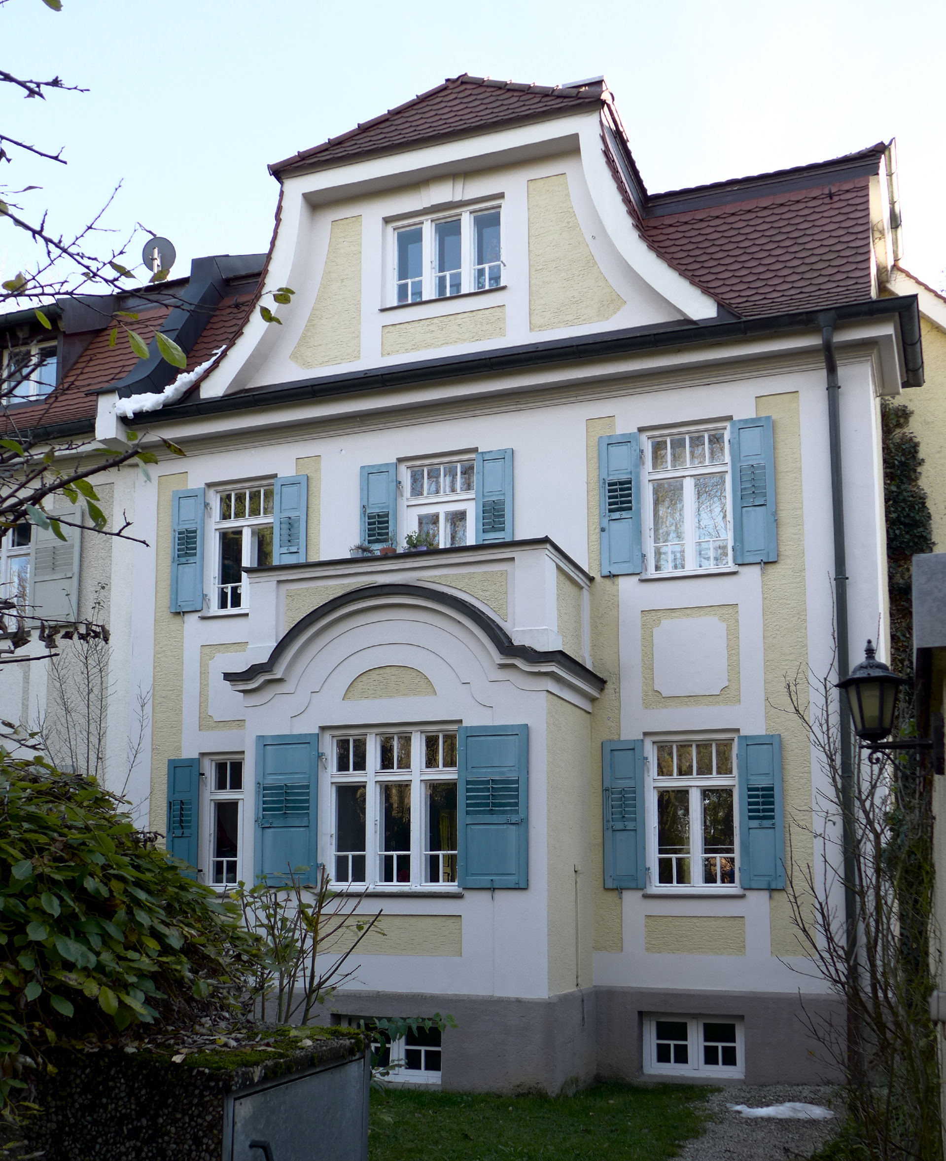 Marsopstr 8, München